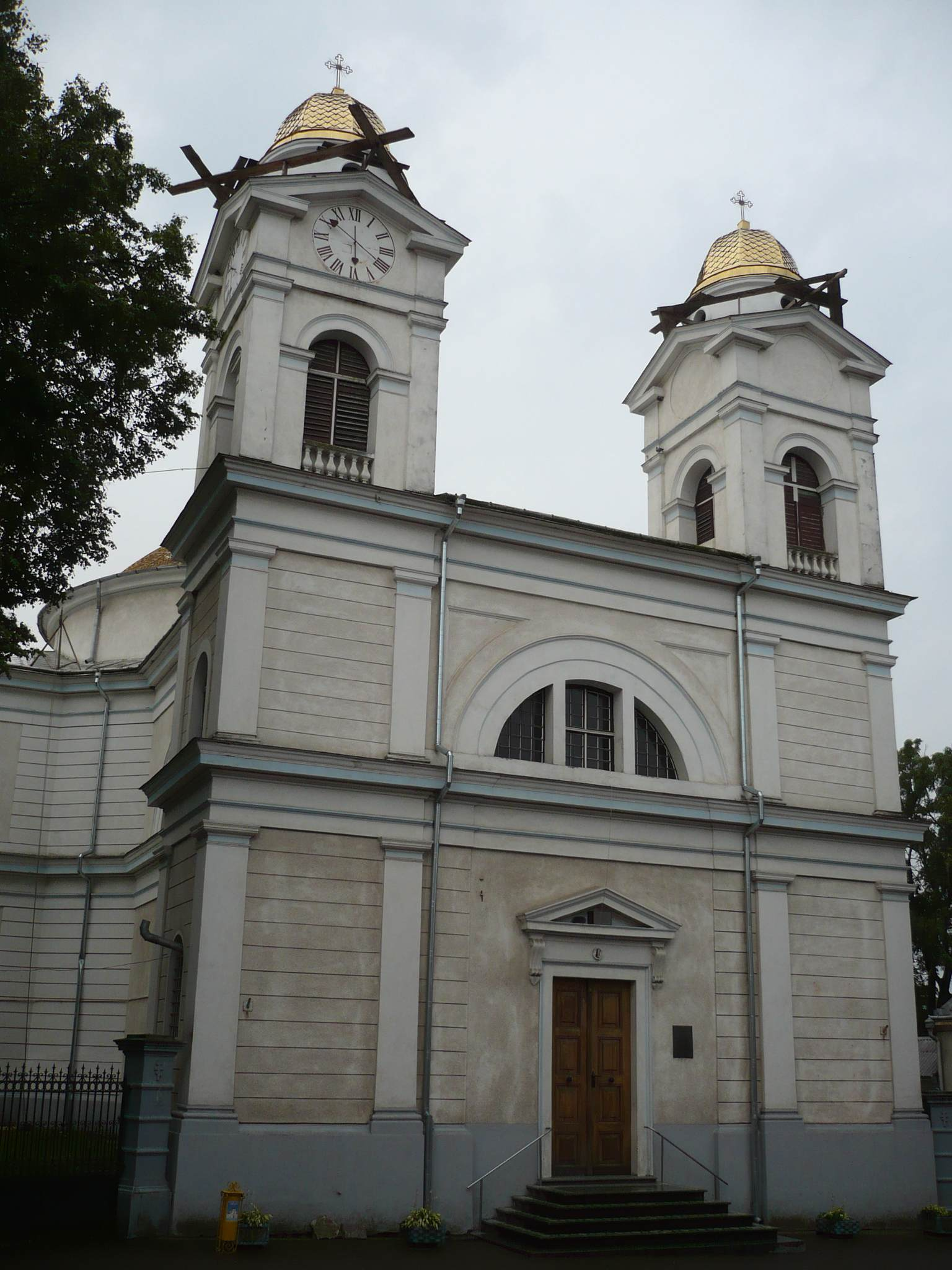 Cerkiew greckokatolicka p.w św. Michała Archanioła w Kołomyji na Ukrainie, 2009 r.